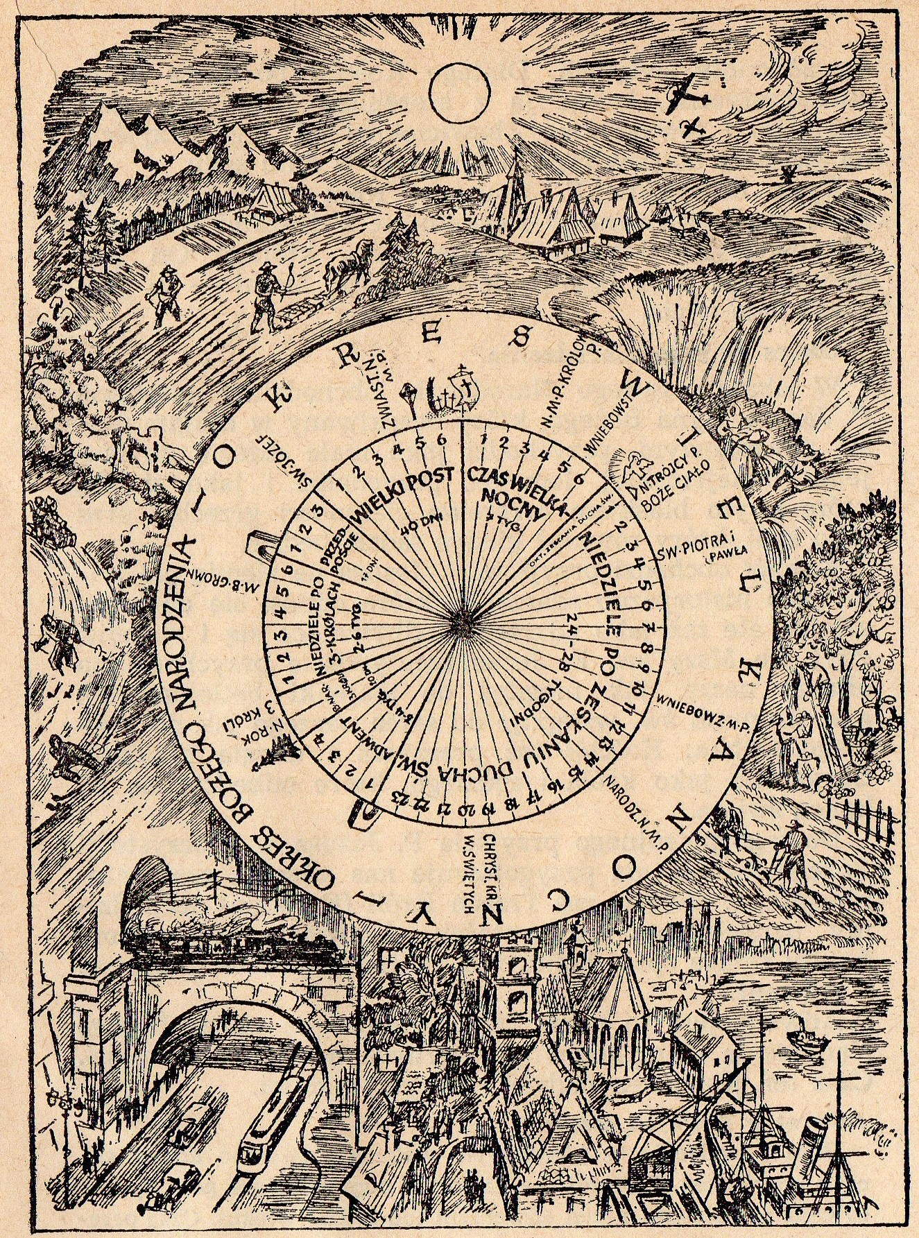 Rok liturgiczny w rysunku.